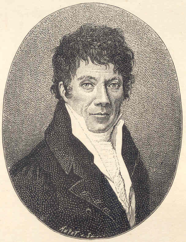 Pierre Jean Louis Ovide Doublet